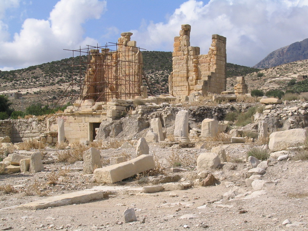 Ruine romaine